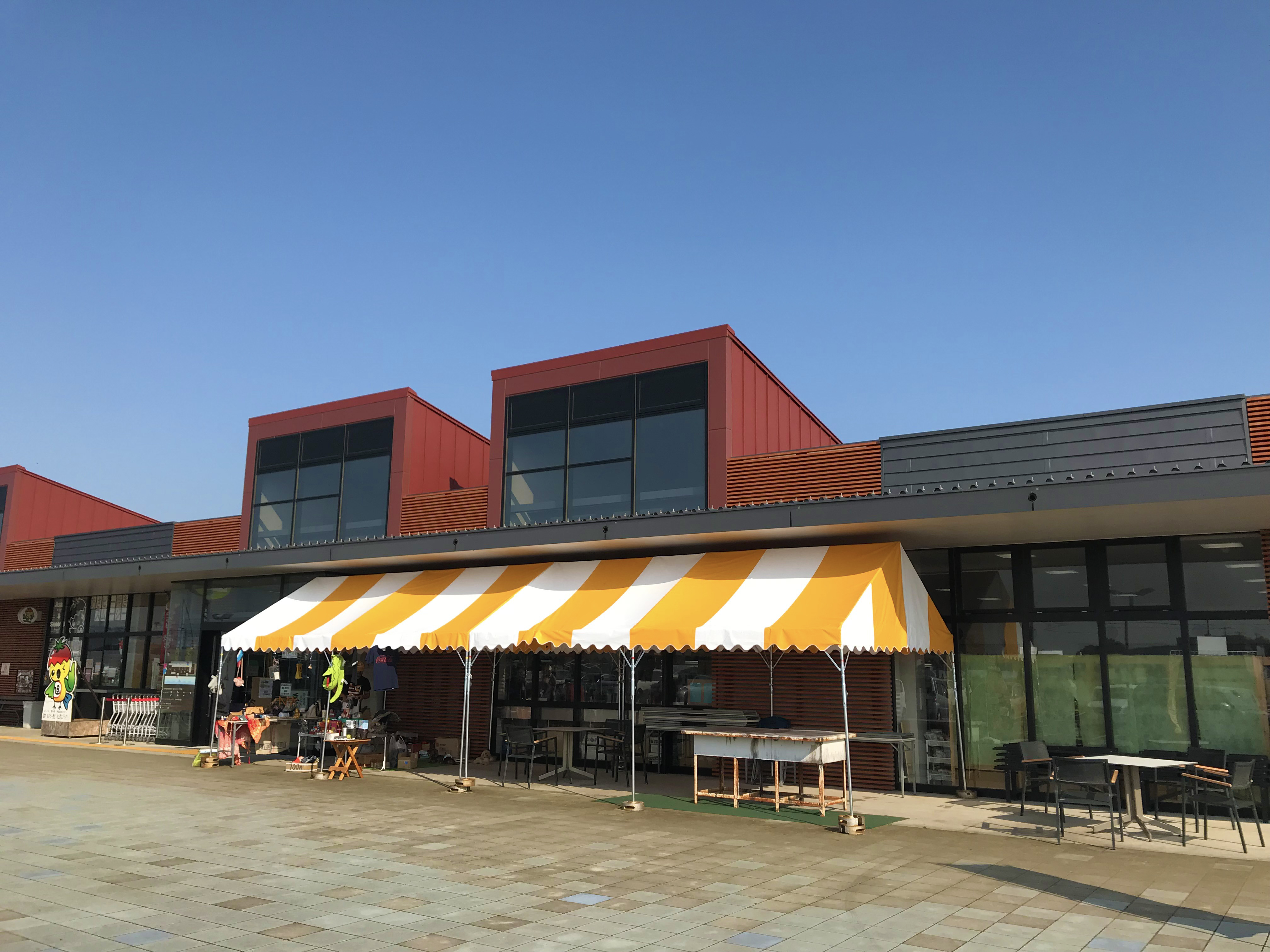 Michinoeki Asahi (道の駅季楽里あさひ Chiba)